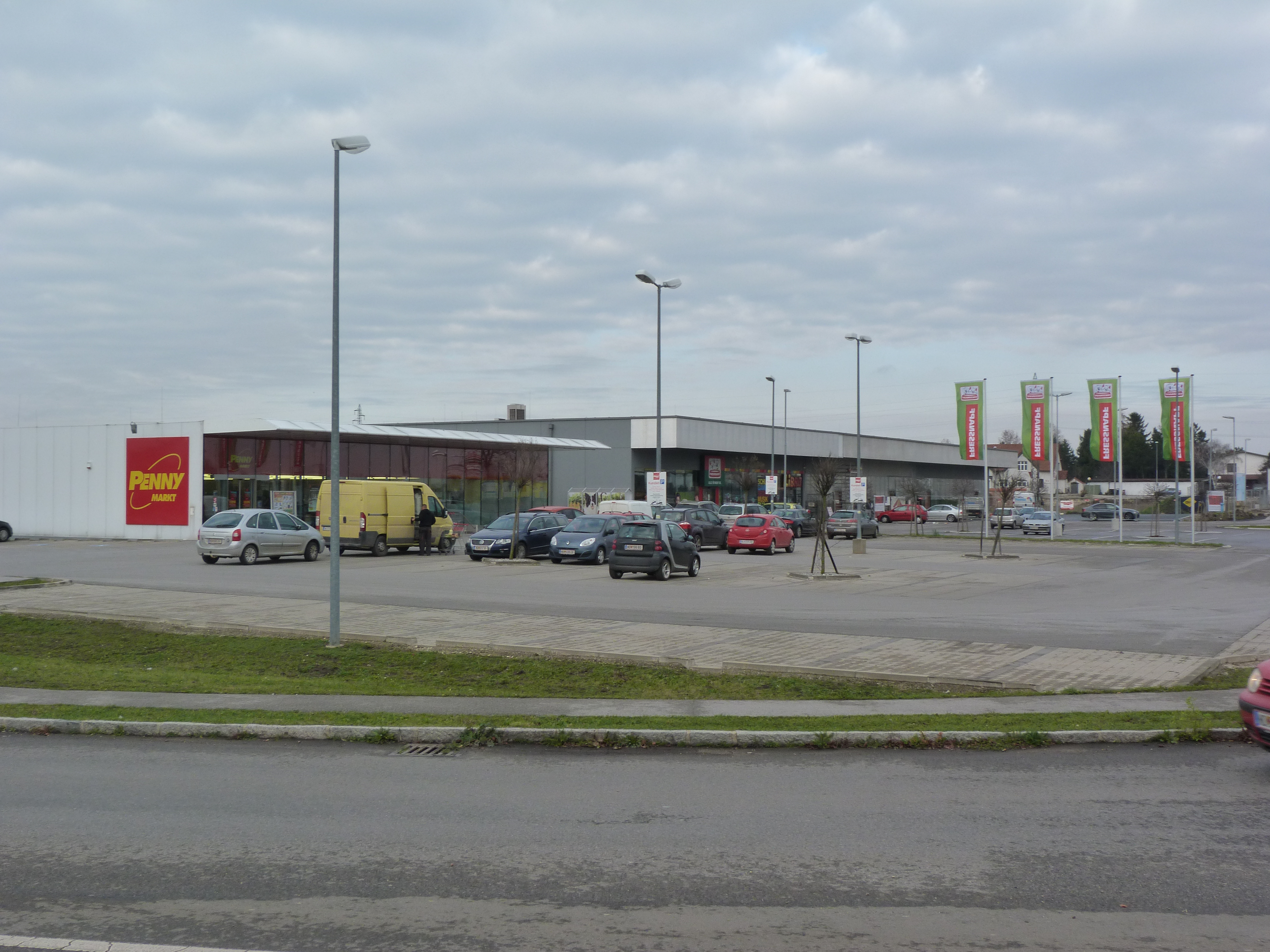 A felvétel 2014. december 4-én készült Boldogasszonyban. Kegytemplom, Kálvária, Benzinkút, Poszter. A hagyomány szerint II. András király uralkodása alatt a Fertő úgy kiöntött, hogy több falut elnyelt a víz. Ezek helyett alapítottak települést 1240-ben. 1324-ben "Zenmária" néven említik először. Területén már az ókorban település volt. Mosonszentandrás felé eső határrészén jelentős római településre utaló leletek kerültek elő. Mária kegyhelye már a 13. században ismert volt. Régi temploma a 14. században épült, ezt a török 1529-ben lerombolta. Mária-kegyképét 1661-ben hozták ide a Fraknói vár várkápolnájából, ahol az Eszterházyak tulajdonában volt. Az Eszterházy Pál által 1668-ban újjáépíttetett templomát és kolostorát 1683-ban a török ismét elpusztította. 1696 és 1702 között az olasz Francesco Martinelli tervei szerint bővítve építették újra fel. Régi híres búcsújáróhely. ©© Derzsi Elekes Andor, Budapest, 2014, Published in the Metapolisz DVD line. You are authorised to use this photo under Creative Commons – even for commercial, for profit purposes. The photo must be attributed to Derzsi Elekes Andor. All of the photos and vids in the Metapolisz DVD line are under Creative Commons and can be used even for commercial – for profit – purposes. Recommended Citation Derzsi Elekes Andor: Metapolisz DVD line